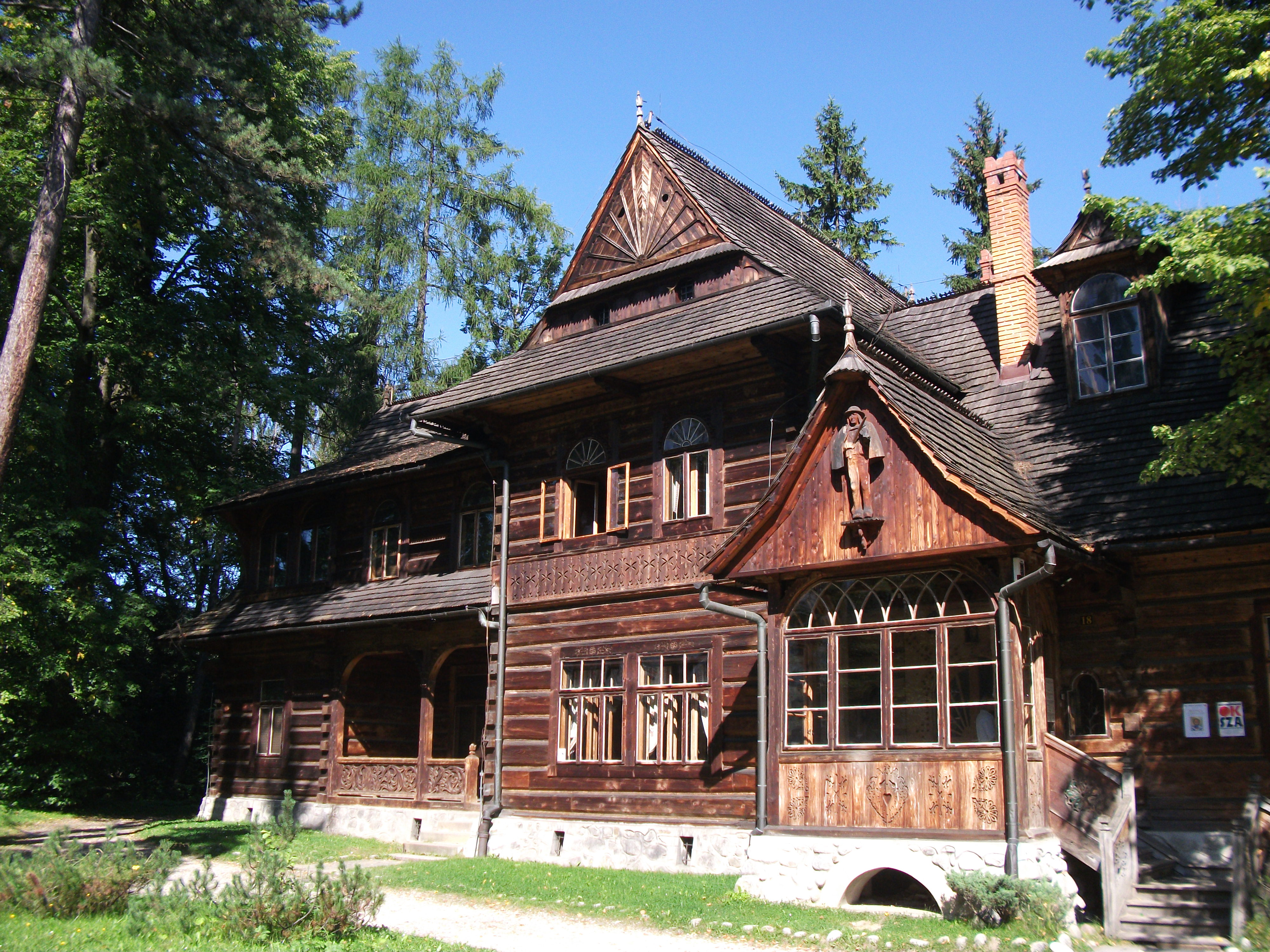 Willa Koliba - Muzeum Stylu Zakopiańskiego w Zakopanem